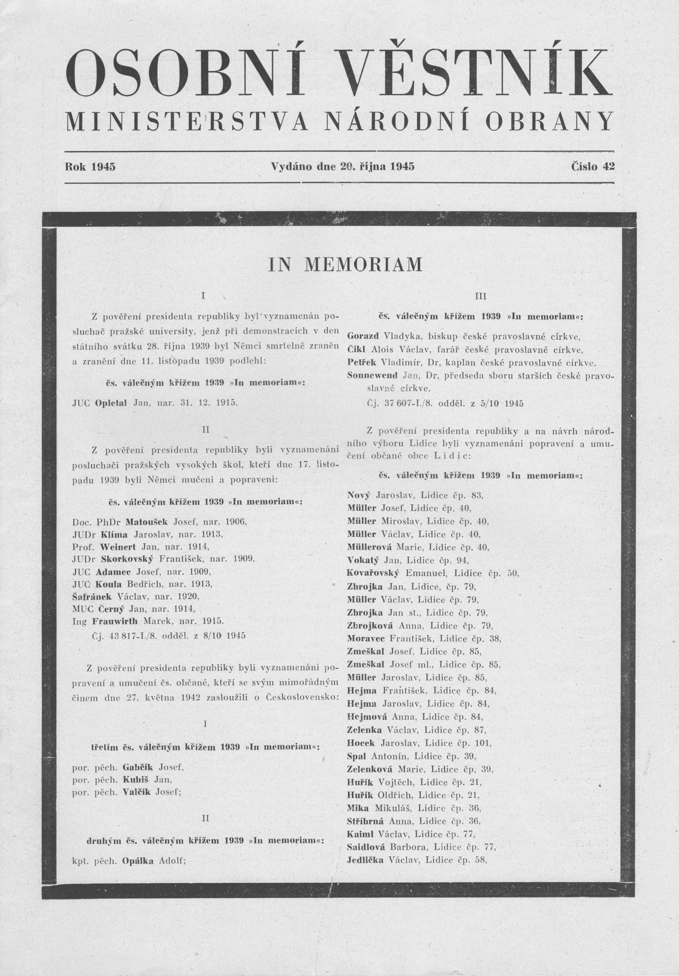 Titulní strana Osobního věstníku MINISTERSTVA NÁRODNÍ OBRANY číslo 42 ze dne 20. října 1945: IN MEMORIAM: Z pověření presidenta republiky byli vyznamenáni popravení a umučení českoslovenští občané: Československým válečným křížem 1939 "In memoriam": následuje abecední výčet jmen .... na straně 359 je uvedeno: armádní generál Bílý Josef, Praha, ... pokračuje výčet jmen .... na straně 363 je uvedeno: plukovník generálního štábu Churavý Josef, narozen 1894, Praha XI, ... pokračuje výčet jmen. Titulní strana tohoto věstníku obsahuje explicitně uvedené vyznamenání československým válečným křížem 1939 "In memoriam" pro JUC Opletal Jan, narozen 31.12.1915 Titulní strana tohoto věstníku obsahuje explicitně a jmenovitě uvedené vyznamenání československým válečným křížem 1939 "In memoriam" pro posluchače pražských vysokých škol, kteří byli Němci mučeni a posléze popraveni dne 17. listopadu 1939: Doc. PhDr. Matoušek Josef narozen 1906; JUDr. Klíma Jaroslav narozen 1913; Prof. Weinert Jan narozen 1914; JUDr. Skorkovský František narozen 1909; JUC Adamec Josef narozen 1909; JUC Koula Bedřich narozen 1913; Šafránek Václav narozen 1920; MUC Černý Jan narozen 1914; Ing. Frauwitrh Marek narozen 1915. Titulní strana tohoto věstníku obsahuje explicitně uvedené vyznamenání třetím československým válečným křížem 1939 "In memoriam" pro: poručíka pěchoty Gabčík Josef, poručíka pěchoty Kubiš Jan, poručíka pěchoty Valčík Josef. Titulní strana tohoto věstníku obsahuje explicitně uvedené vyznamenání druhým československým válečným křížem 1939 "In memoriam" pro: kapitán pěchoty Opálka Adolf. Na poslední straně věstníku zcela dole je podepsán: divizní generál Ludvík Svoboda, vlastní rukou, ministr národní obrany.